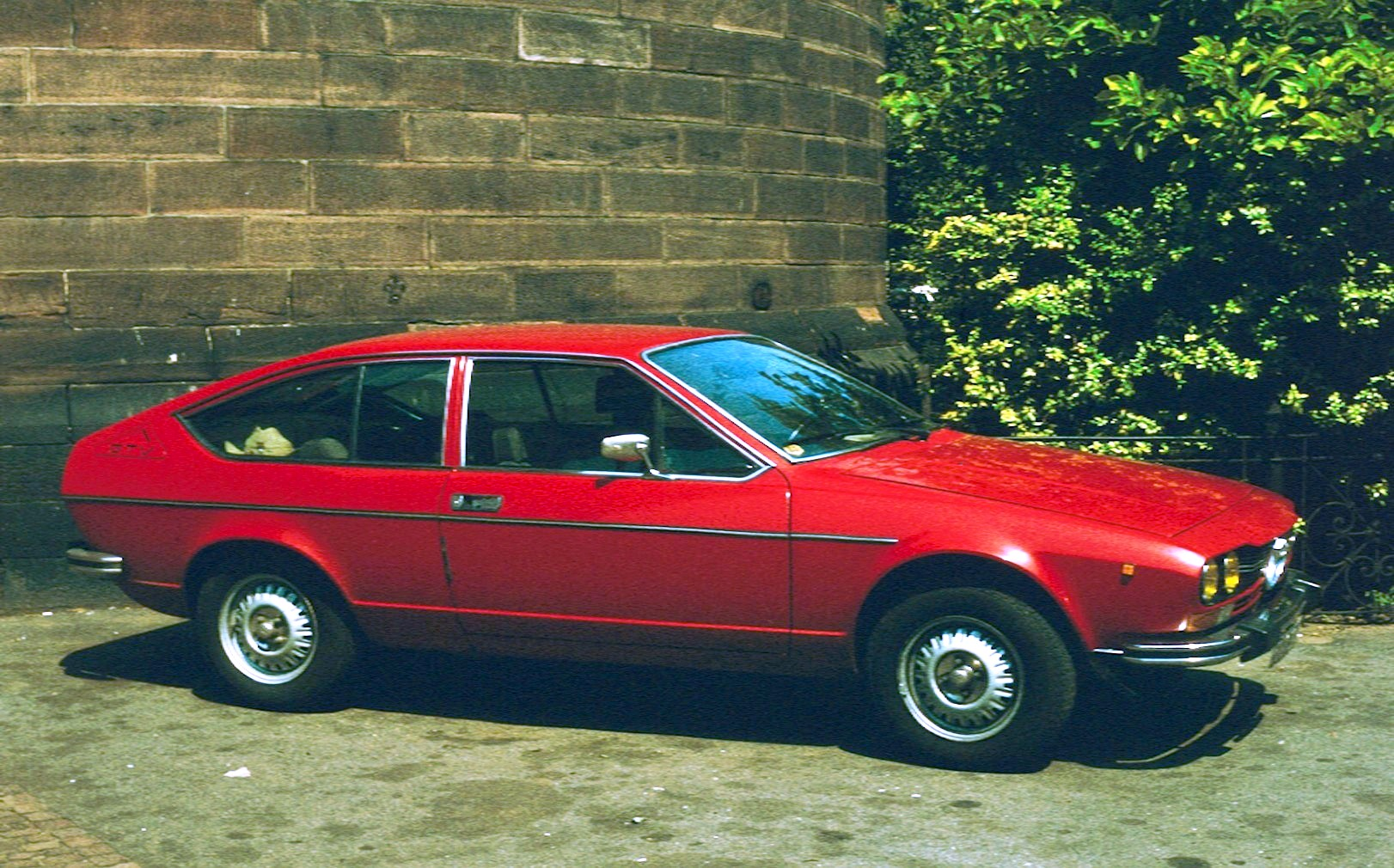 Alfa Romeo Alfetta GTV Coupe